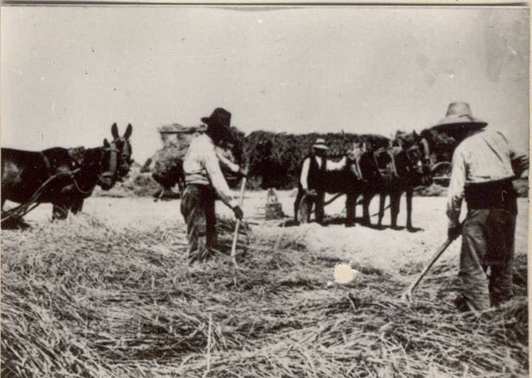 Recolección - Herrín de Campos (Valladolid) - Cuaderno. Álbum de Valladolid - Fotografía 60 x 42 B/N